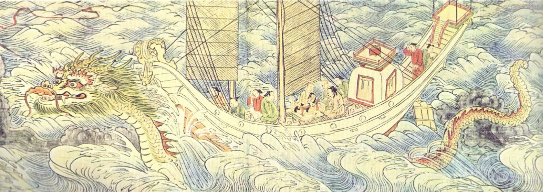 Kegonshū-soshi-eden (Vie de Gishō et Gengyō, moines de la secte Kegon en Corée), attribué à Enichibō Jōnin: Zemmyō métamorphosée en dragon conduit le bateau de Gishō (fin du troisième rouleau de la Légende de Gishō). Première moitié du XIIIe siècle-rouleau horizontal, couleurs sur papier-(H. 31,6cm). Au (Temple Gangyō-ji Kōzan-ji)- Kyōto.